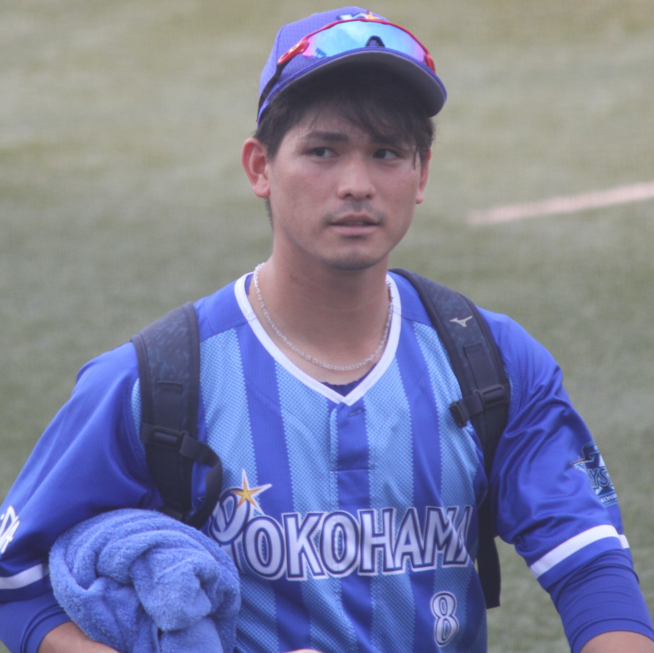 横浜DeNAベイスターズ外野手の神里 和毅。横浜スタジアムにて。